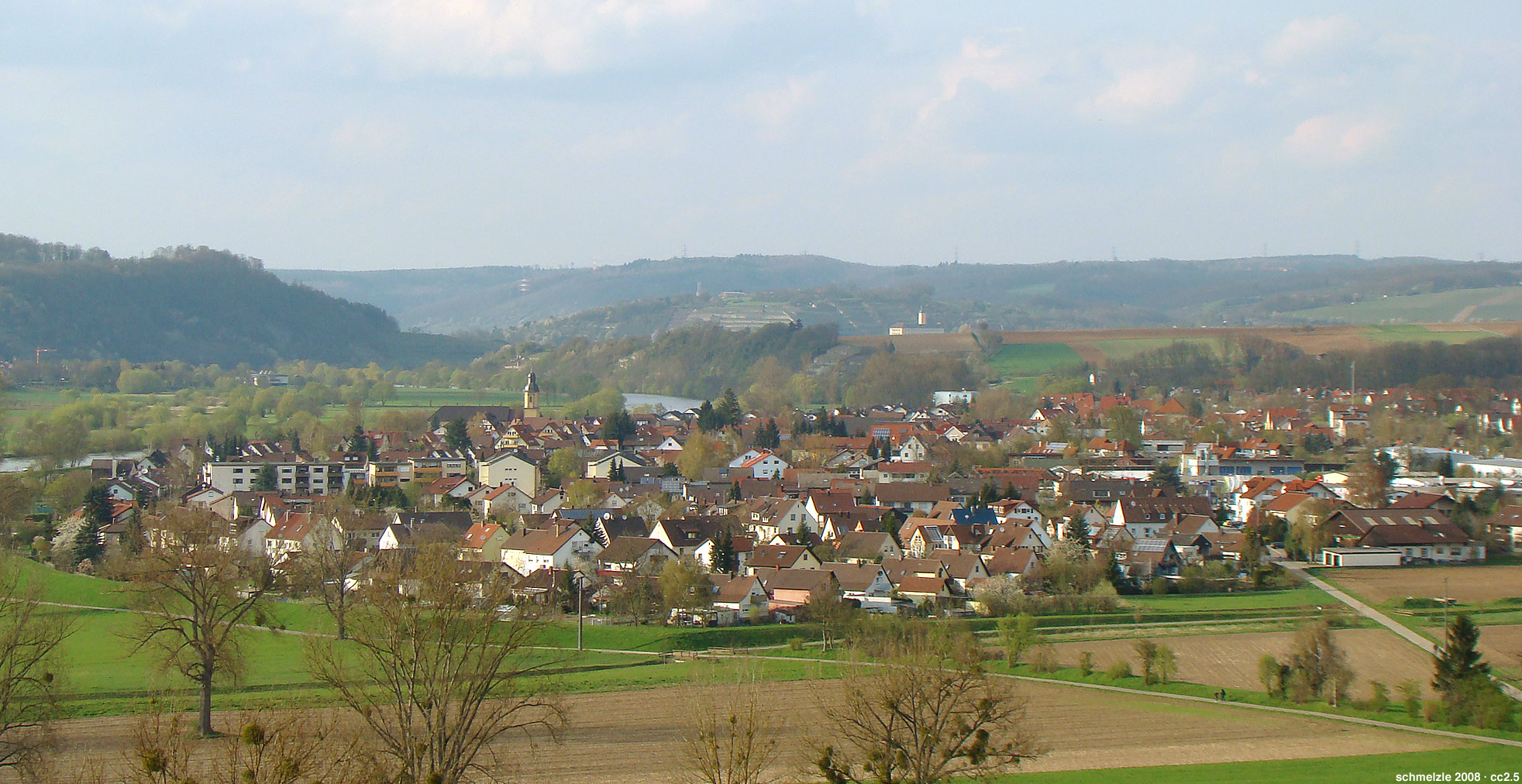 Offenau, Blick von Bad Wimpfen